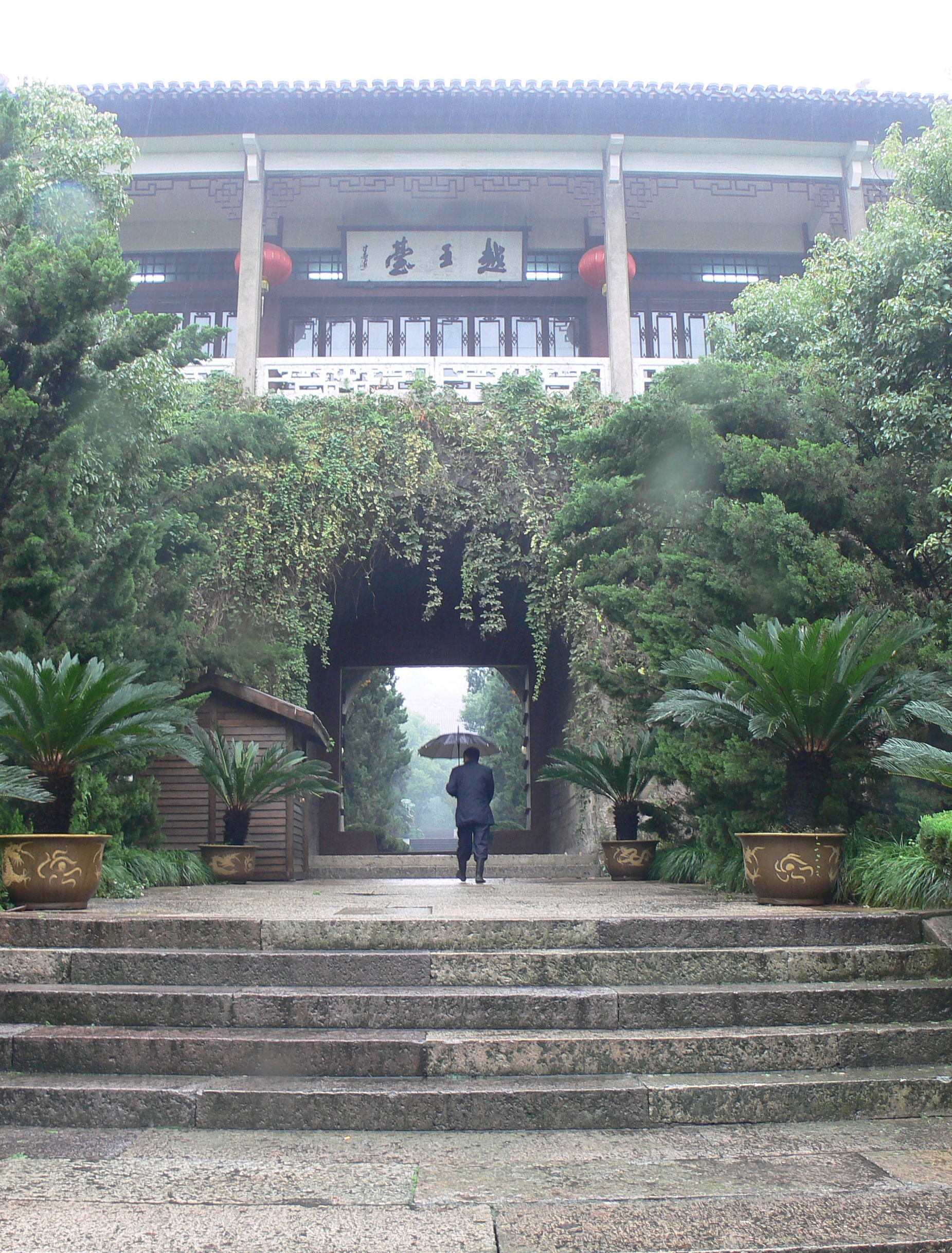 绍兴越王台